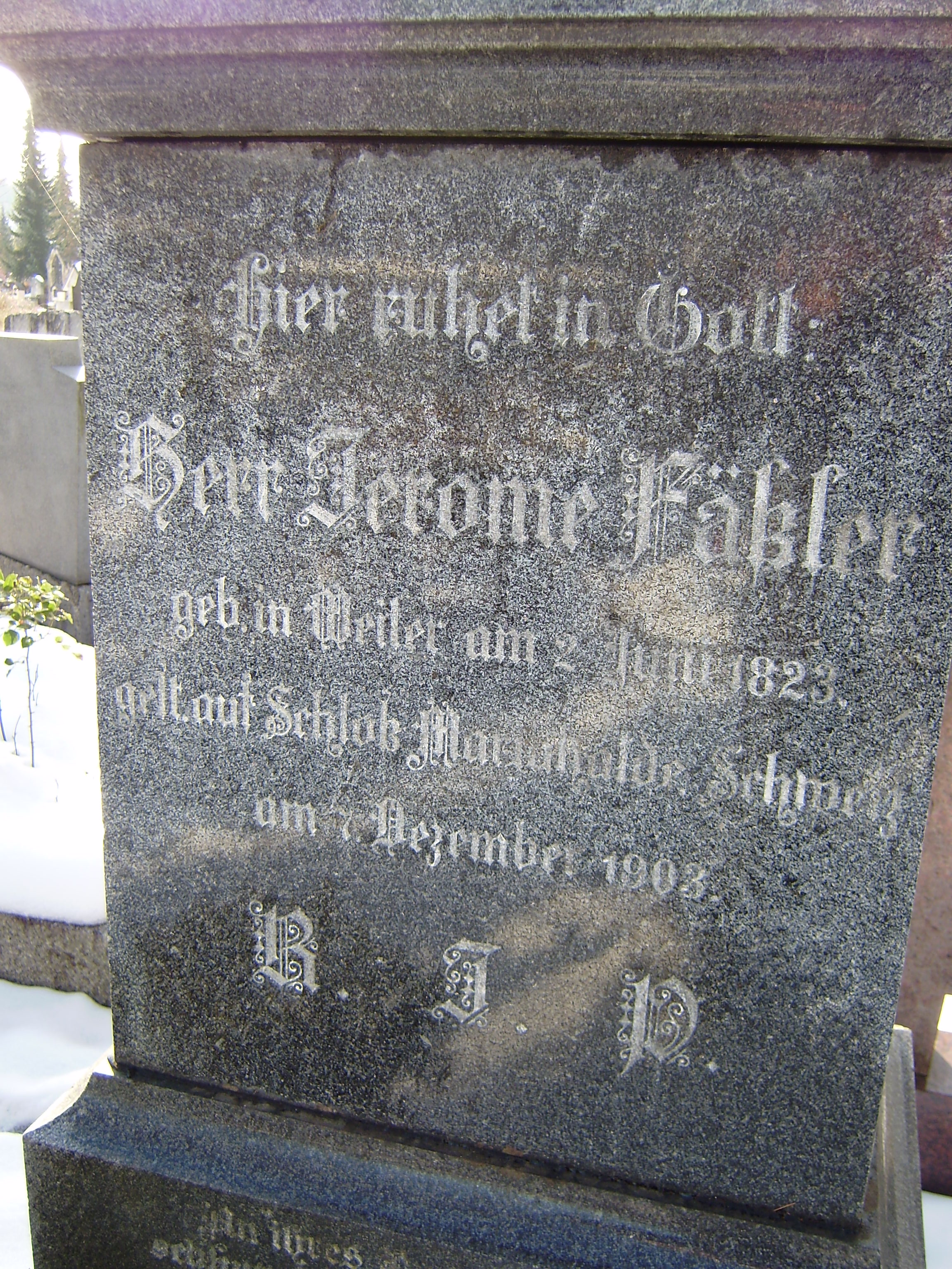 Grabstein von Hieronymus Fäßler (alias Jerome Fassler) auf dem Friedhof hinter der Pfarrkirche von Weiler im Allgäu (Bayern, Deutschland)